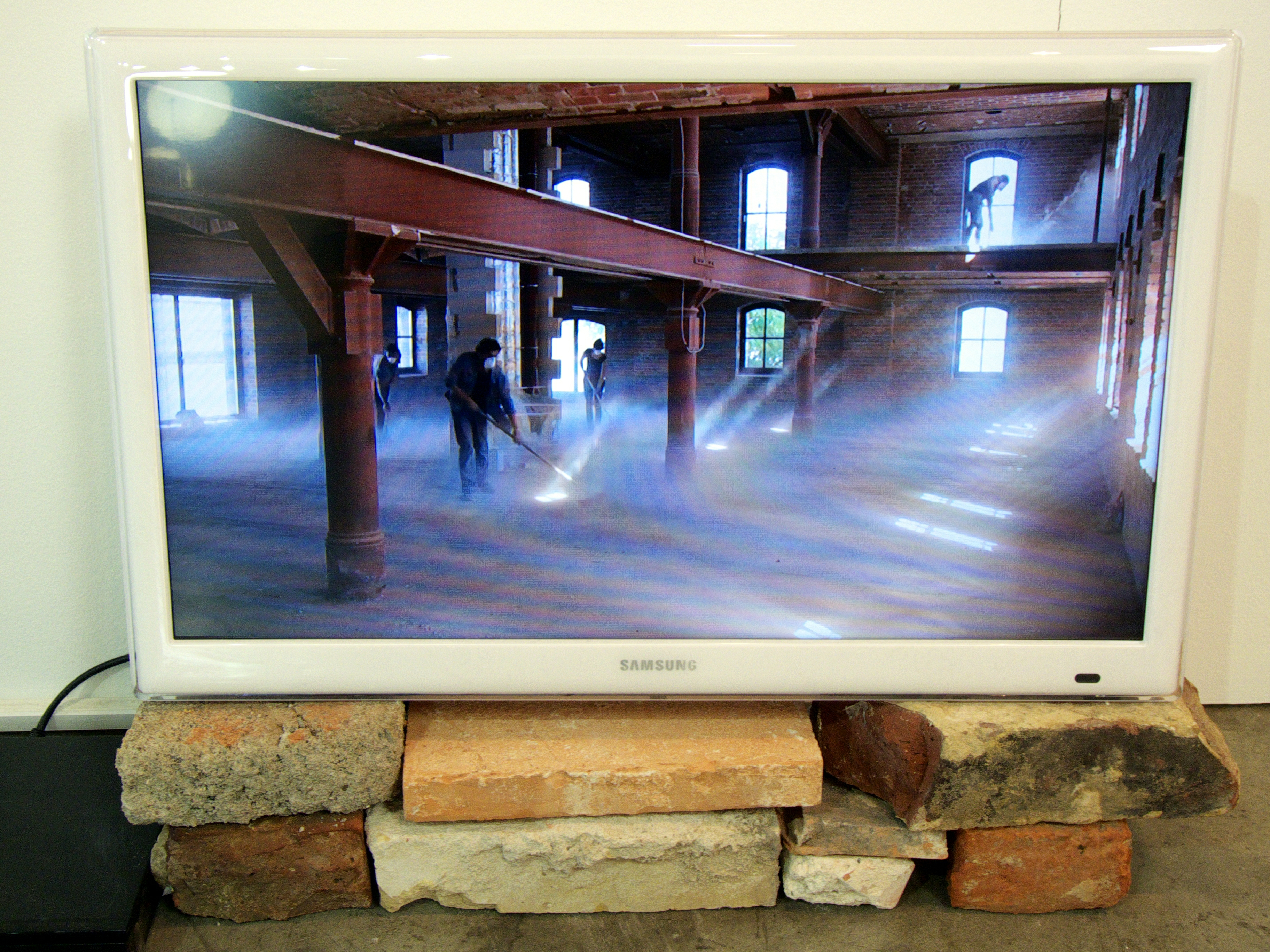 Arturo Hernández Alcázar - Artissima 2012